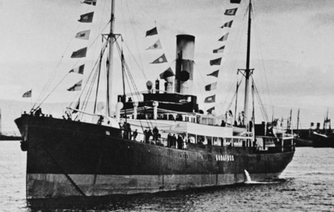 Die Godafoss im Hafen von Reykjavik